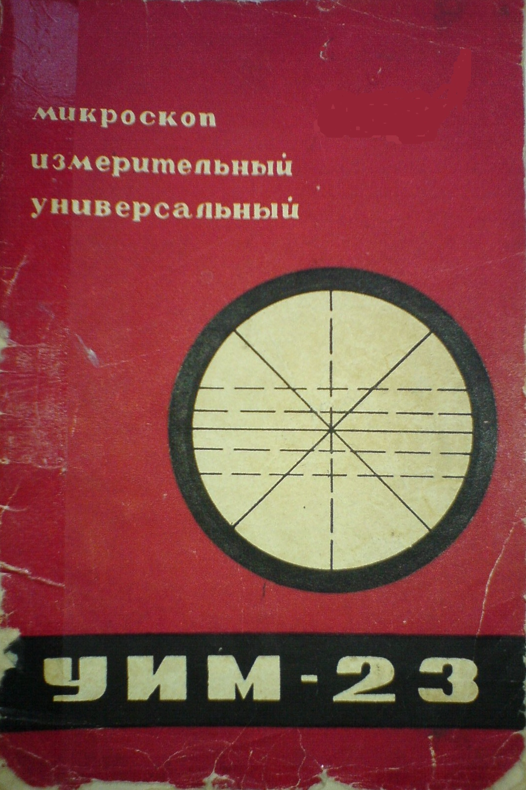 Обложка